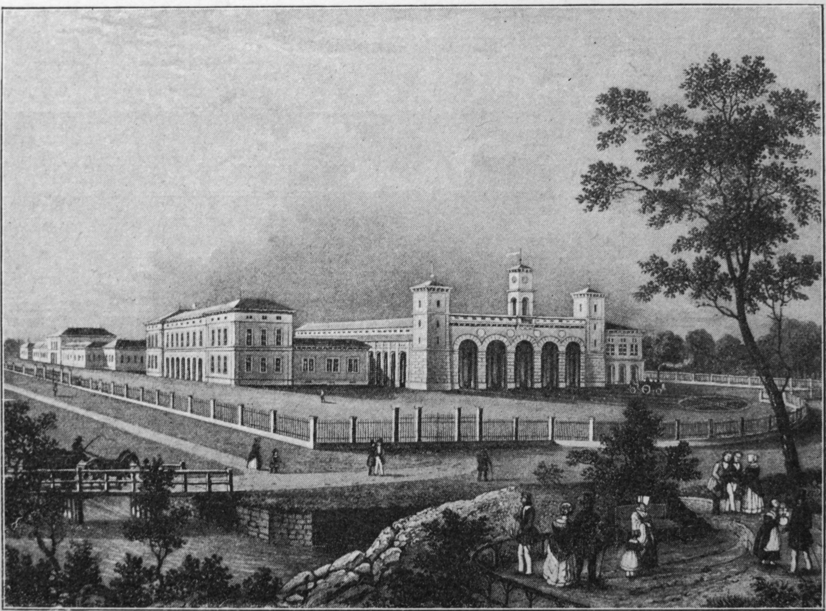 Bahnhof Zürich von Gustav Albert Wegmann. Erbaut 1846–1847, abgebrochen nach etwa 20 Jahren